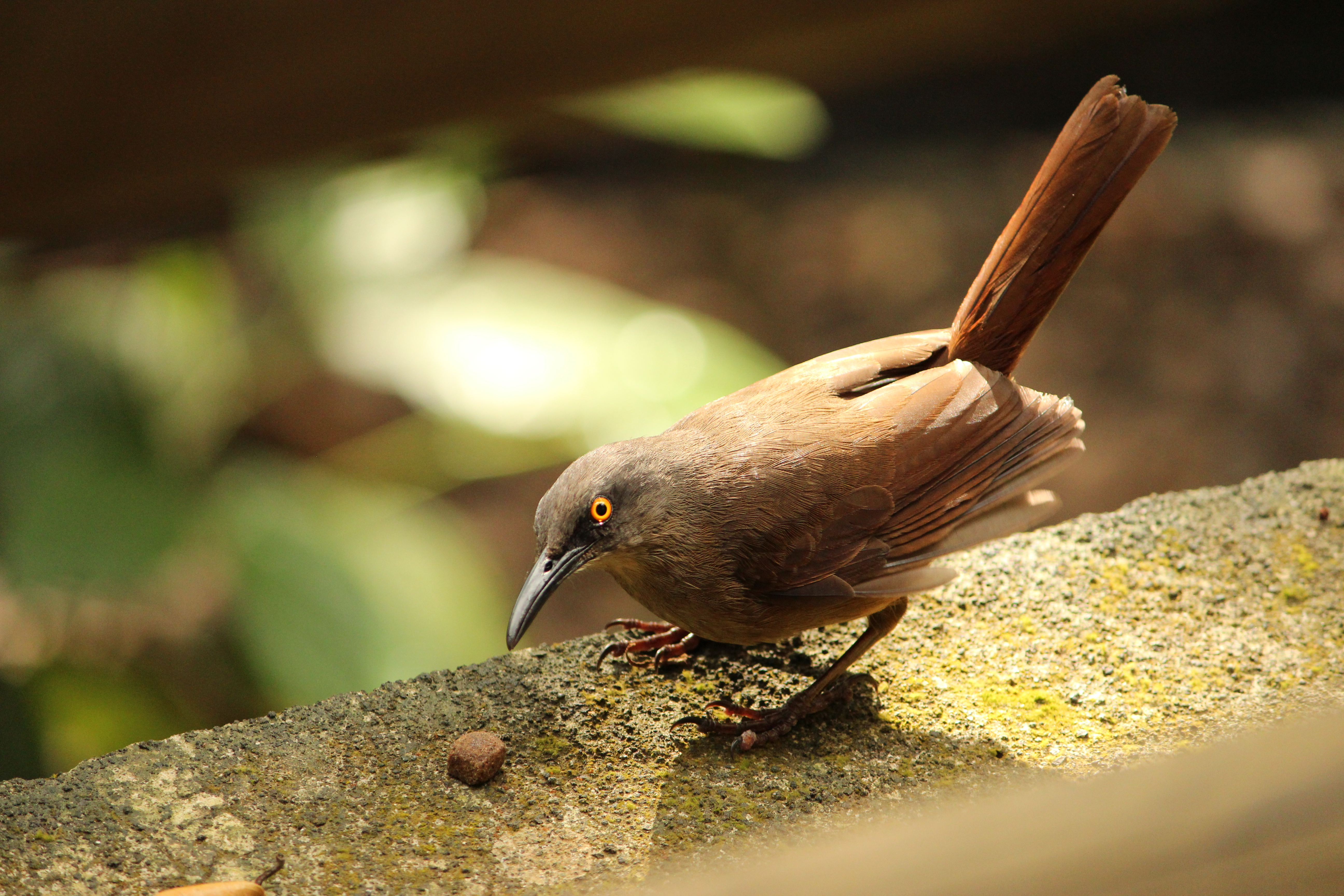 Cinclocerthia ruficauda, photgraphié au Parc des Mamelles, Guadeloupe